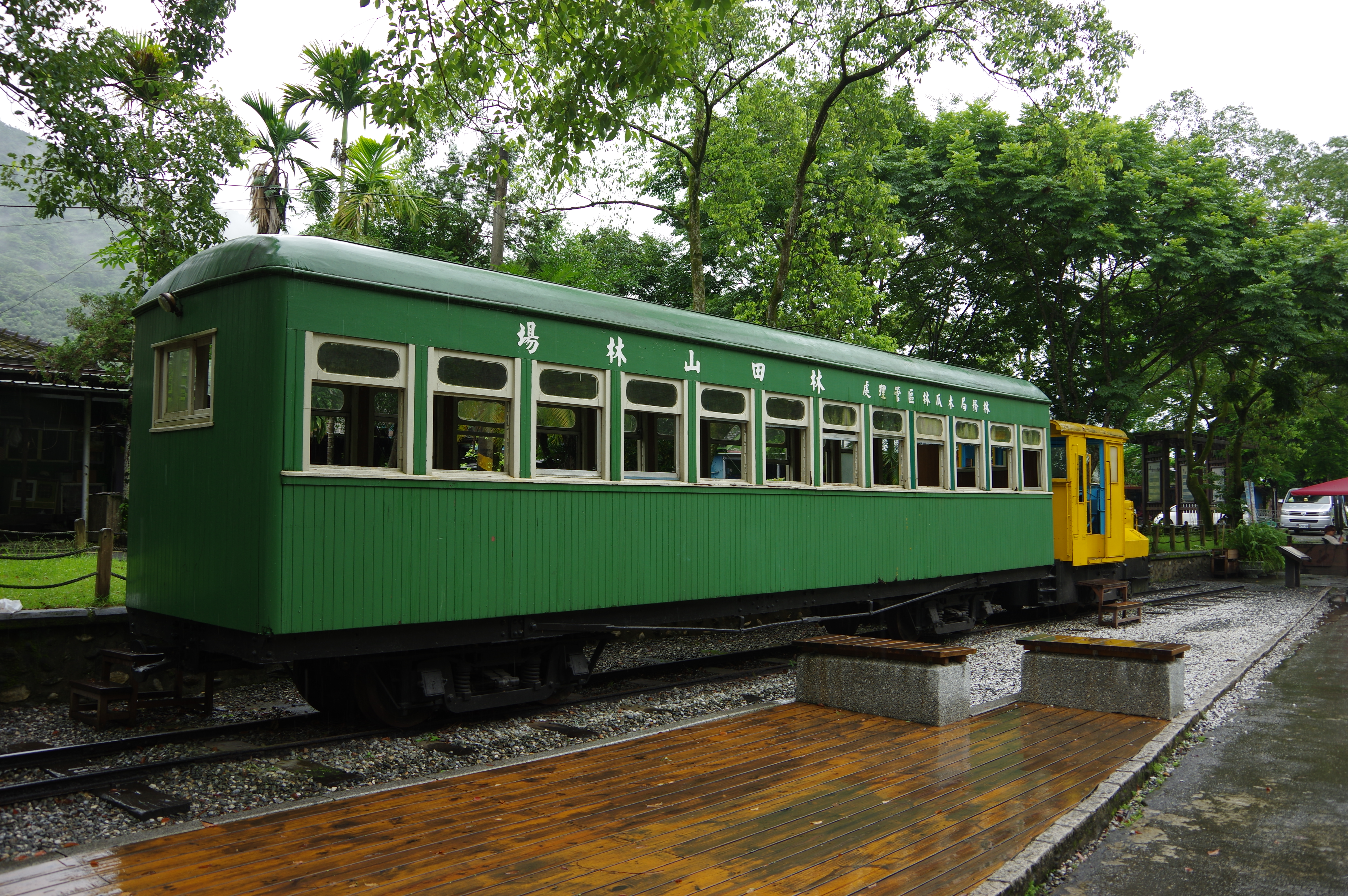 花蓮縣林田山林業文化園區保存的森林鐵路客車